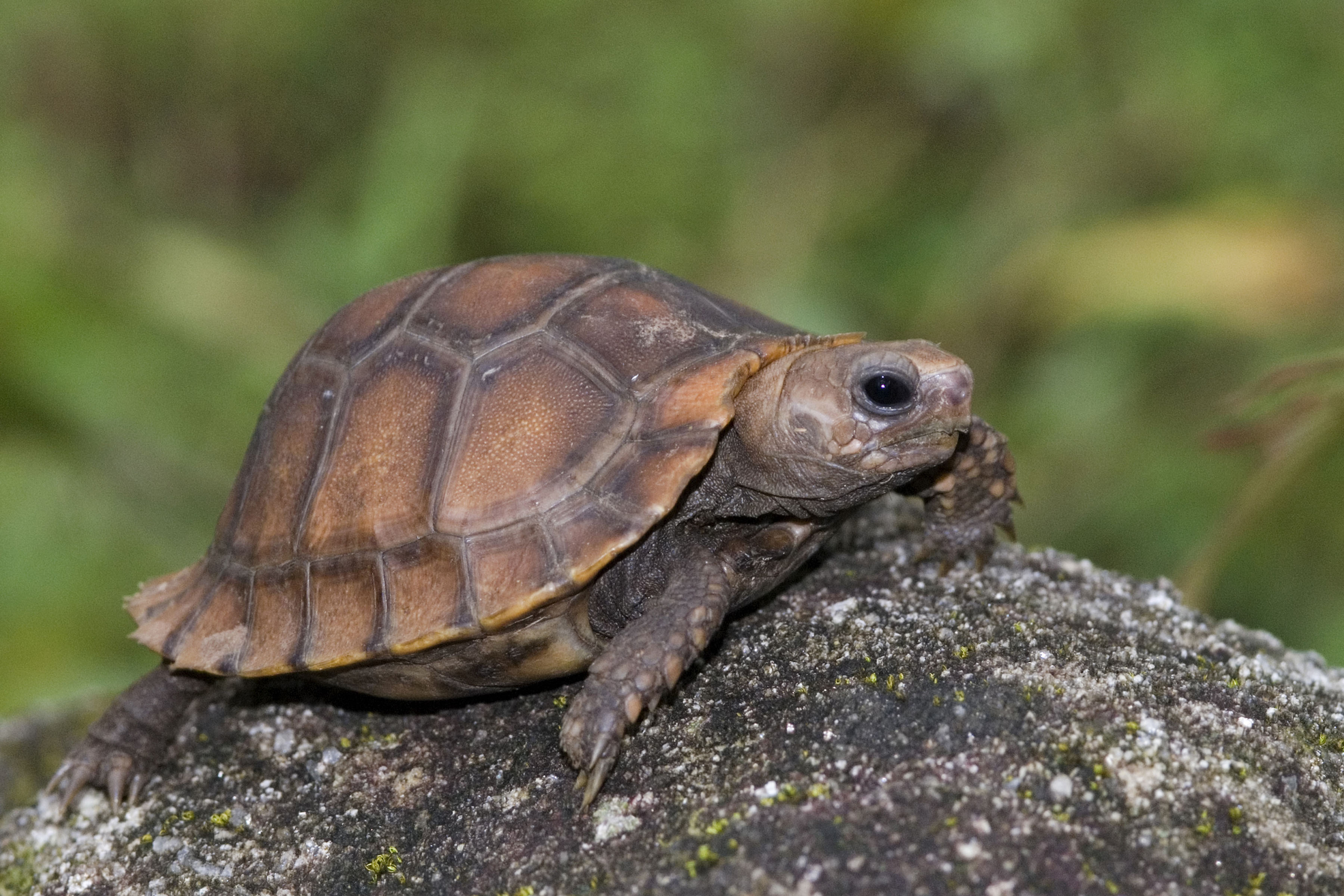 കാട്ടാമ